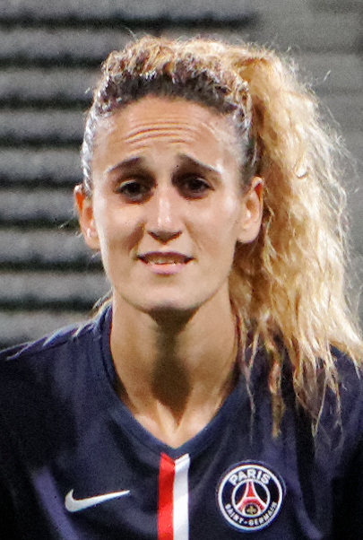 Kheira Hamraoui, Ligue des champions, PSG - Twente, 15 octobre 2014.